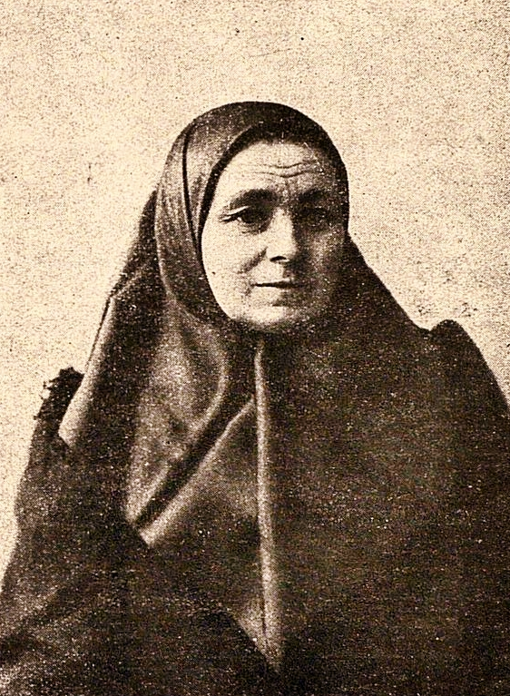 Akilina Loginovna Sozonova, madre del rivoluzionario russo Egor Sozonov (1879-1910)